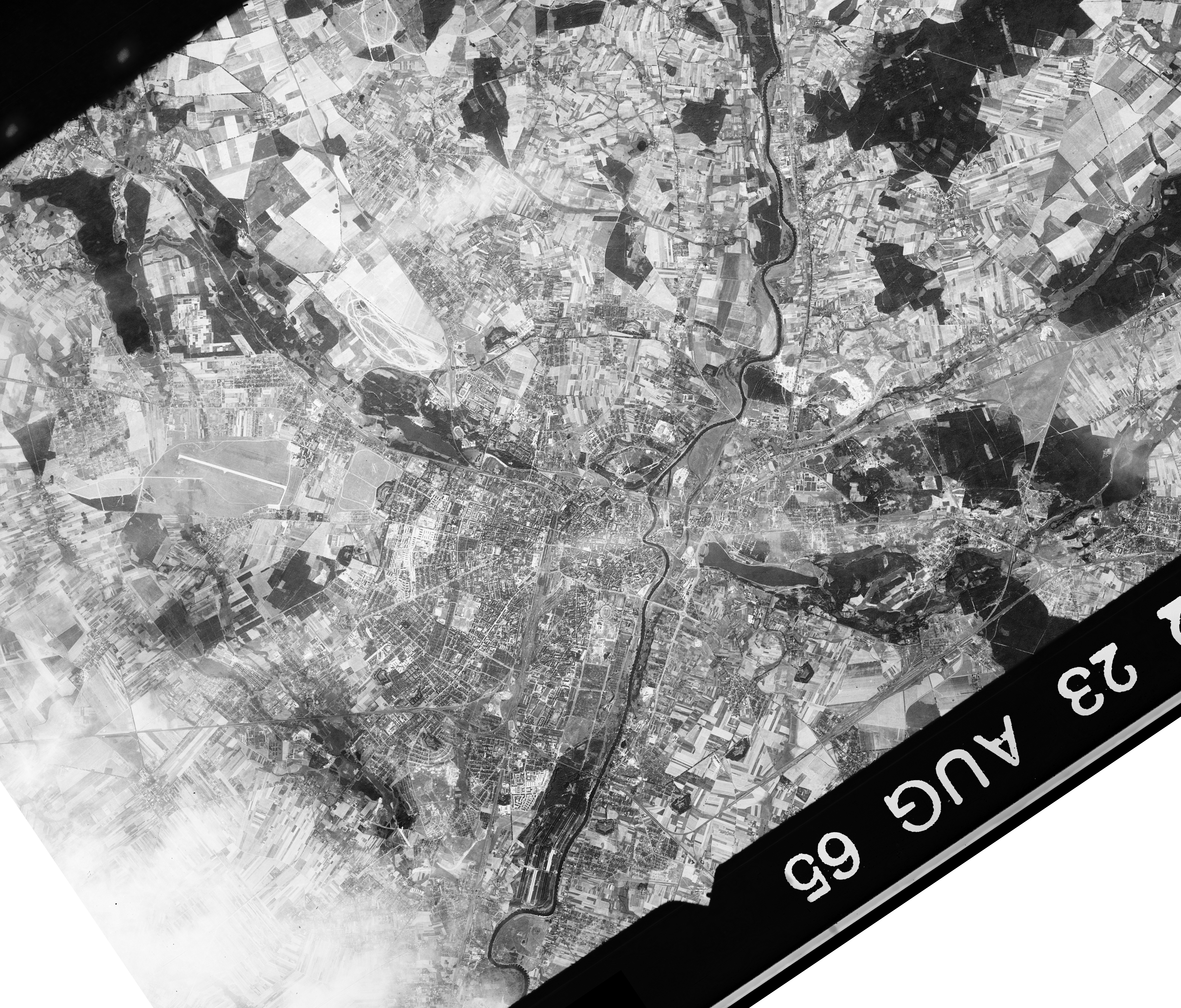 Poznań i okolice (Kiekrz, Komorniki, Czerwonak, Swarzędz, Antoninek) sfotografowane przez amerykańskiego satelitę wywiadowczego Corona 98 (KH-4A 1023) w dniu 23 sierpnia 1965 r. Jest to najpewniej pierwsze zdjęcie satelitarne na którym uwidoczniono Poznań, a co najmniej pierwsze takie amerykańskie zdjęcie.